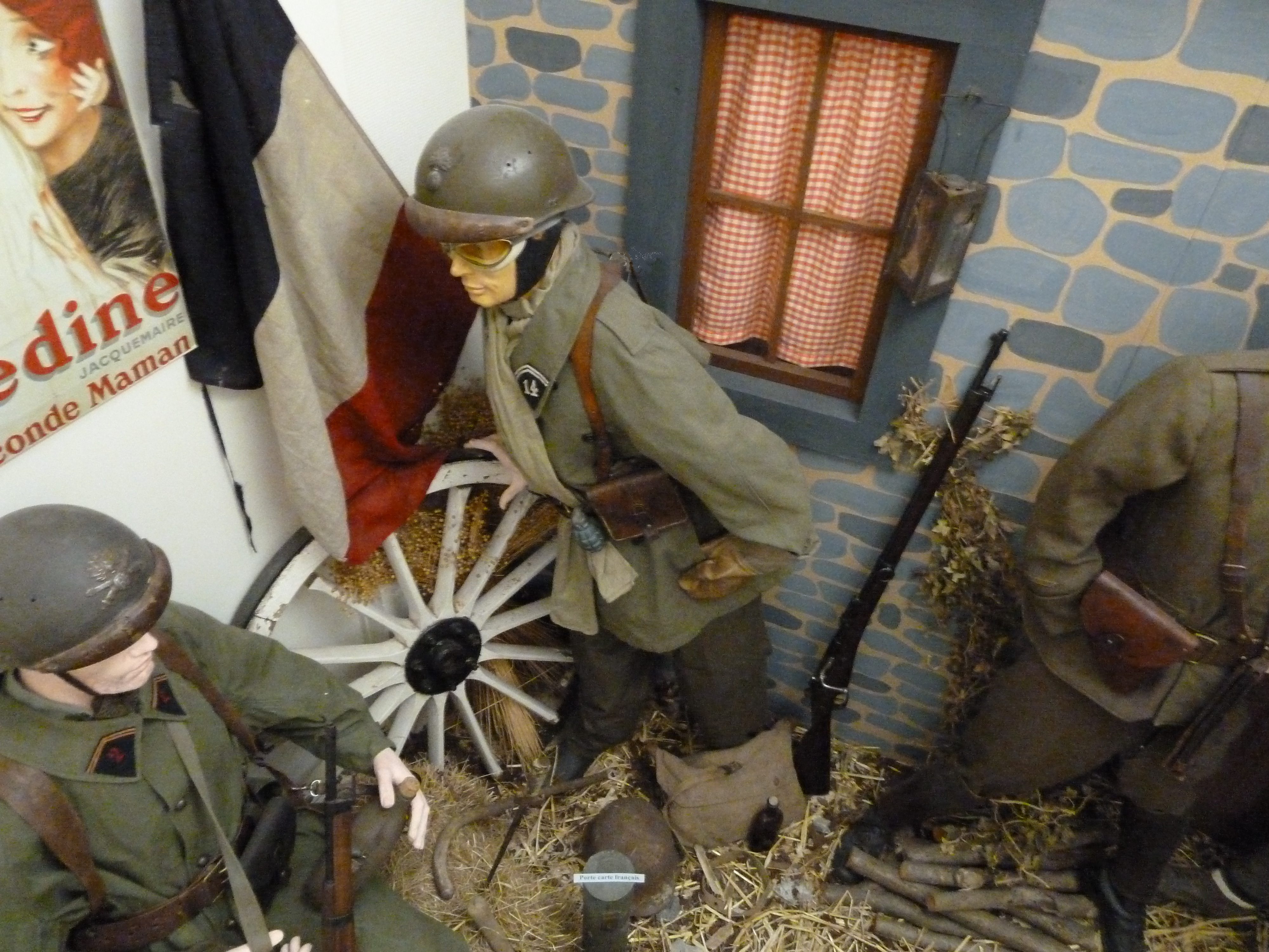 Soldats français en nouvelle tenue